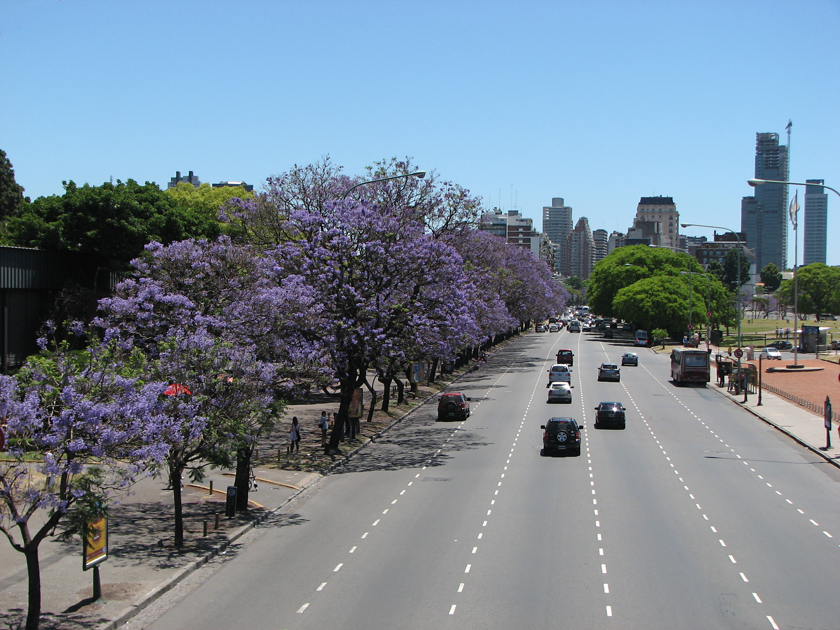 Avenida Figueroa Alcorta. Al este y al oeste llueve lloverá una flor y otra flor celeste del jacarandá. María Elena Walsh